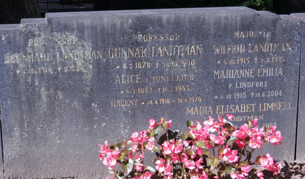 Grab des finnischen Ethnologen, Philosophen, Soziologen und Anthropologen Gunnar Landtman (1878-1940) auf dem Friedhof Hietaniemi in Helsinki